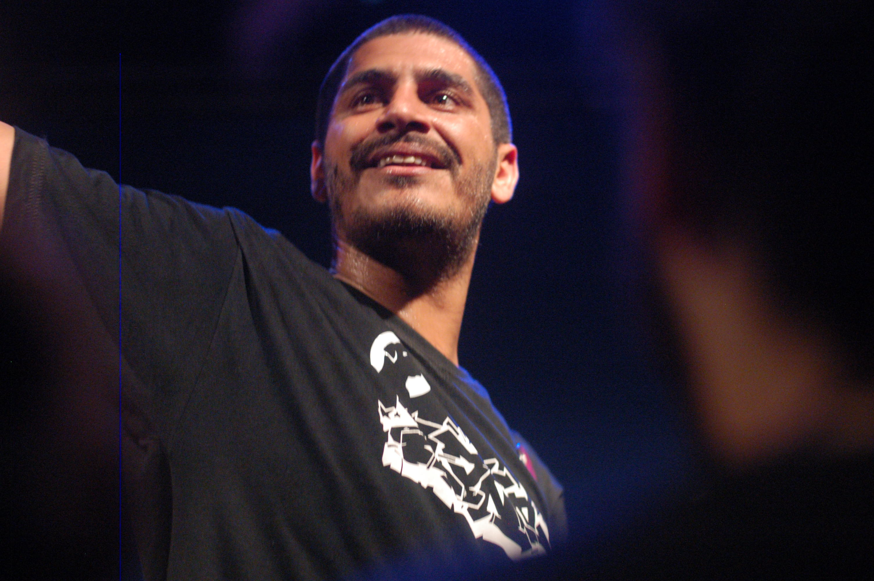 Show de lançamento do vinil Subirosdoistiozin do cantor Criolo no Matilha Cultural.